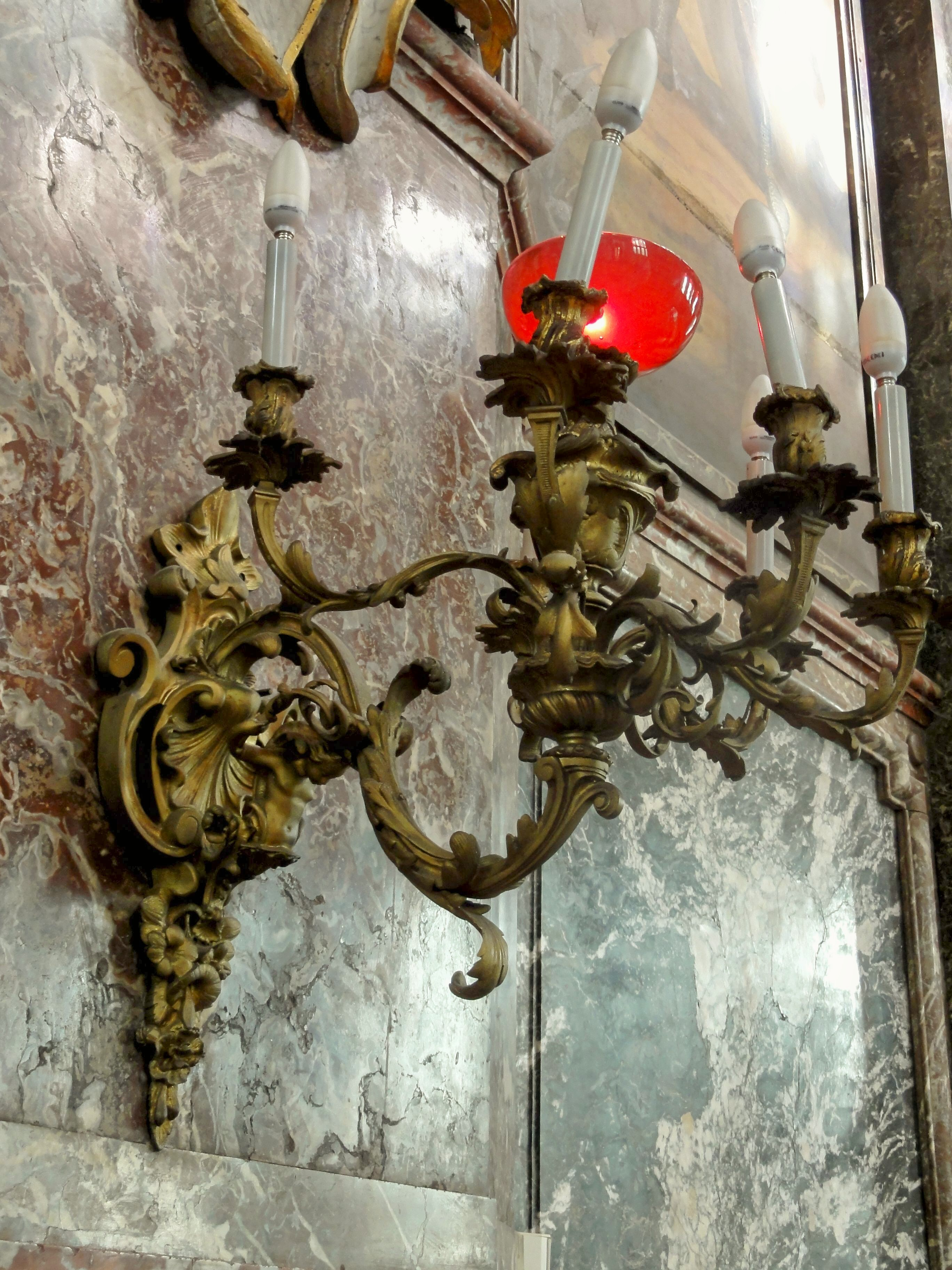 L'un des dix-neuf bras de lumière (girandoles) du chœur.